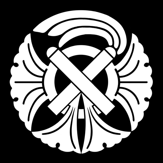 「銀杏守（祇園銀杏）」紋（染抜）